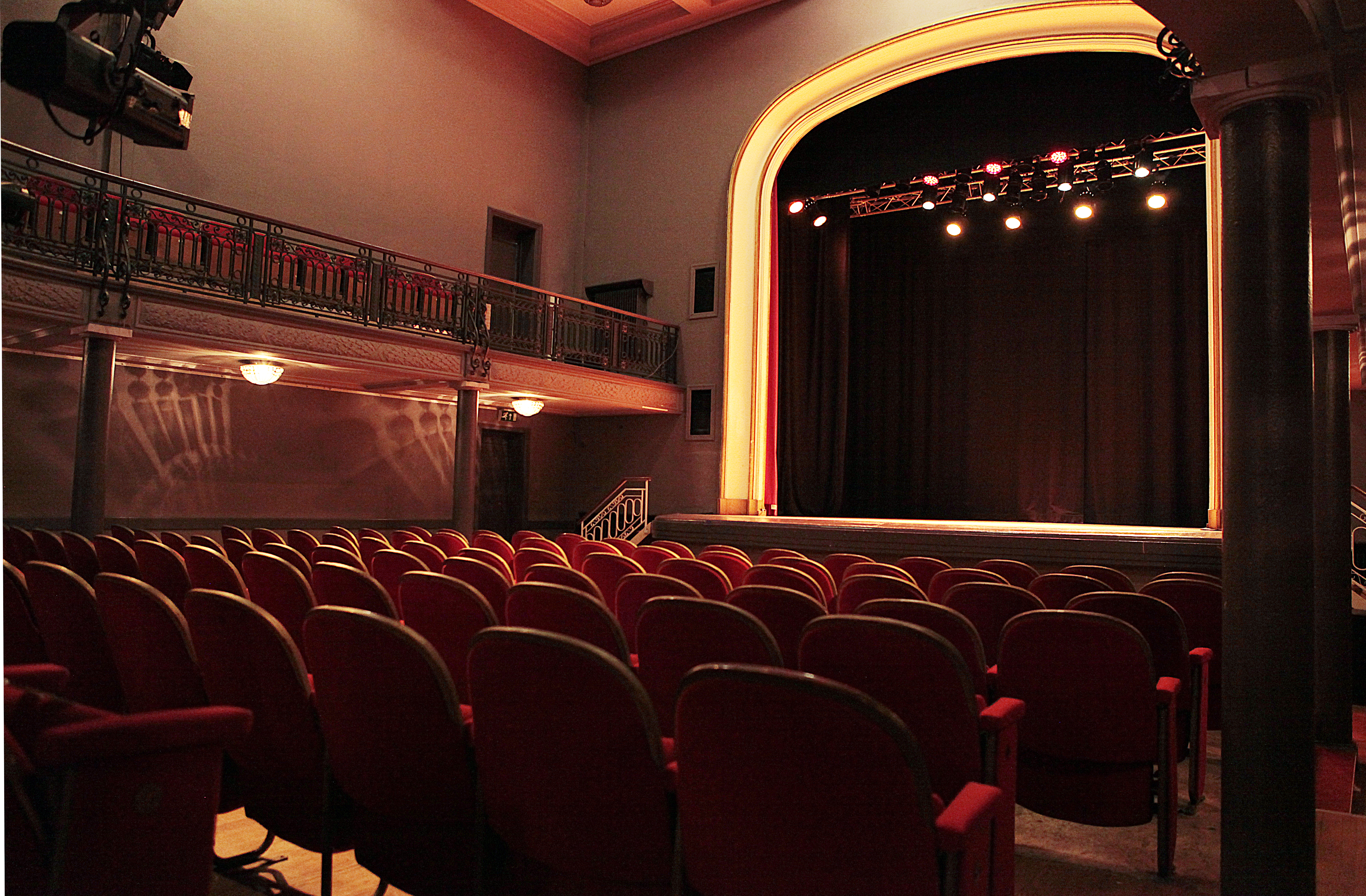 Vue intérieure de la salle